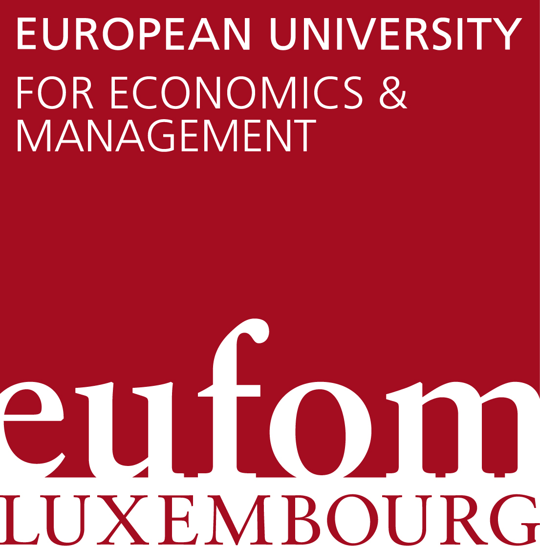 Logo der European University for Economics & Management A.s.b.l.